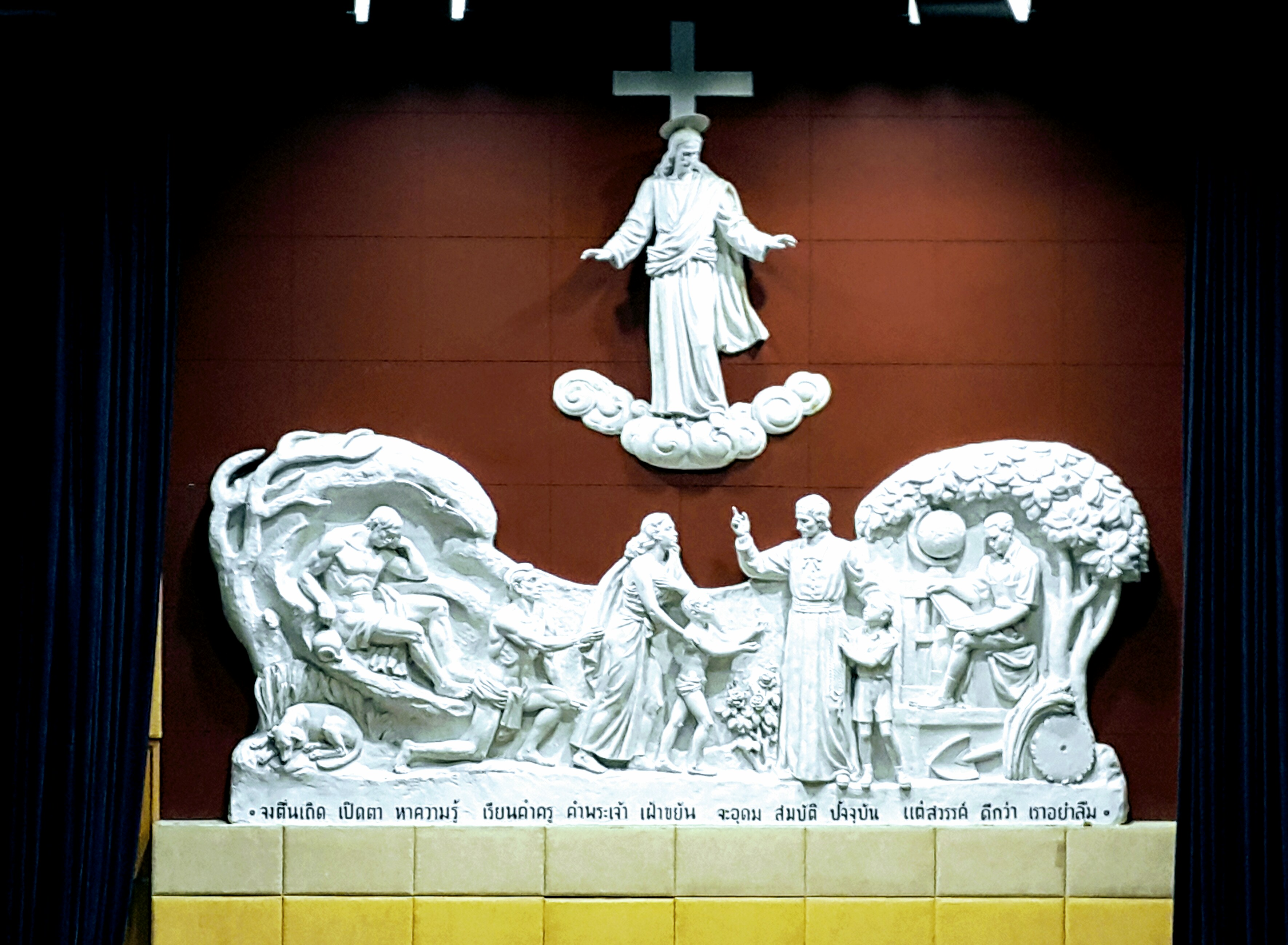 หน้าบัน "จงตื่นเถิดฯ" ควบคุมการก่อสร้างโดย ศิลป์ พีระศรี ติดตั้ง ณ โรงเรียนอัสสัมชัญ